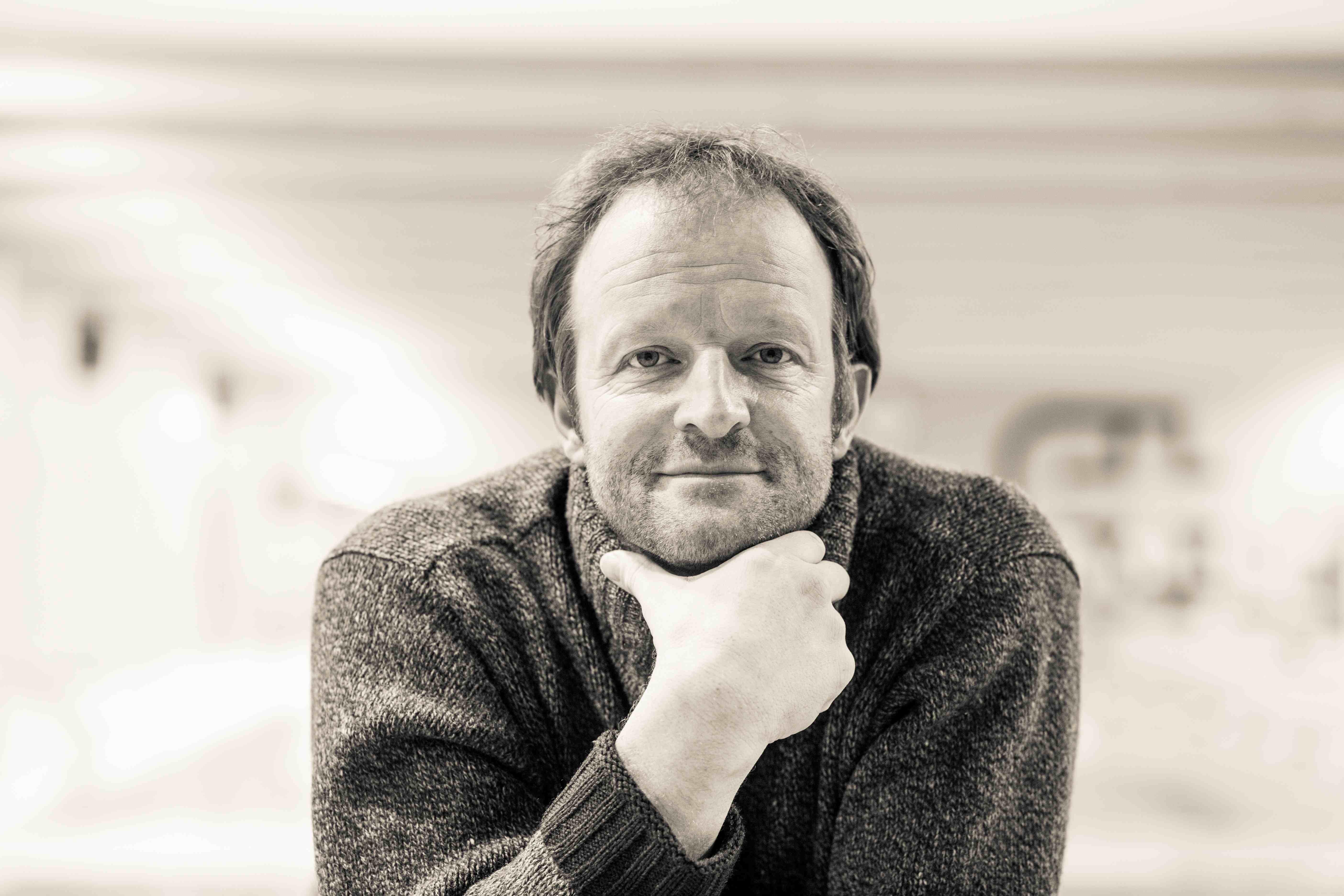 (*1969, Freiburg i. Brg. ) ist deutscher Schauspieler und Kabarettist, der vor allem durch die Rolle des „Bernd Clemens“ in der SWR Serie „Die Fallers“ sowie durch seine Kabarettfigur „Fidelius Waldvogel“ berühmt wurde.